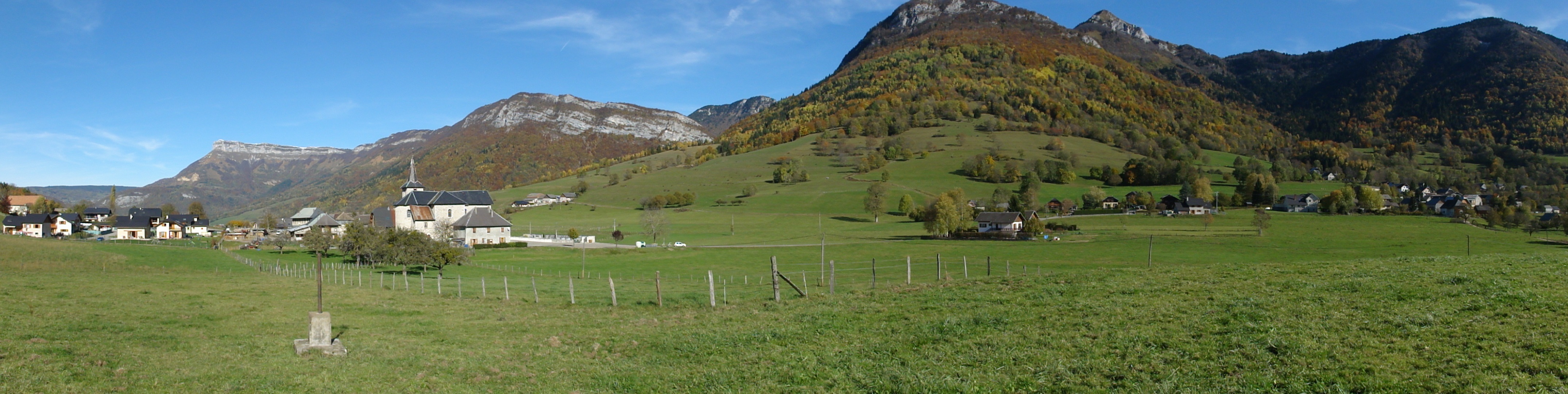 Panoramique du chef-lieu de Puygros